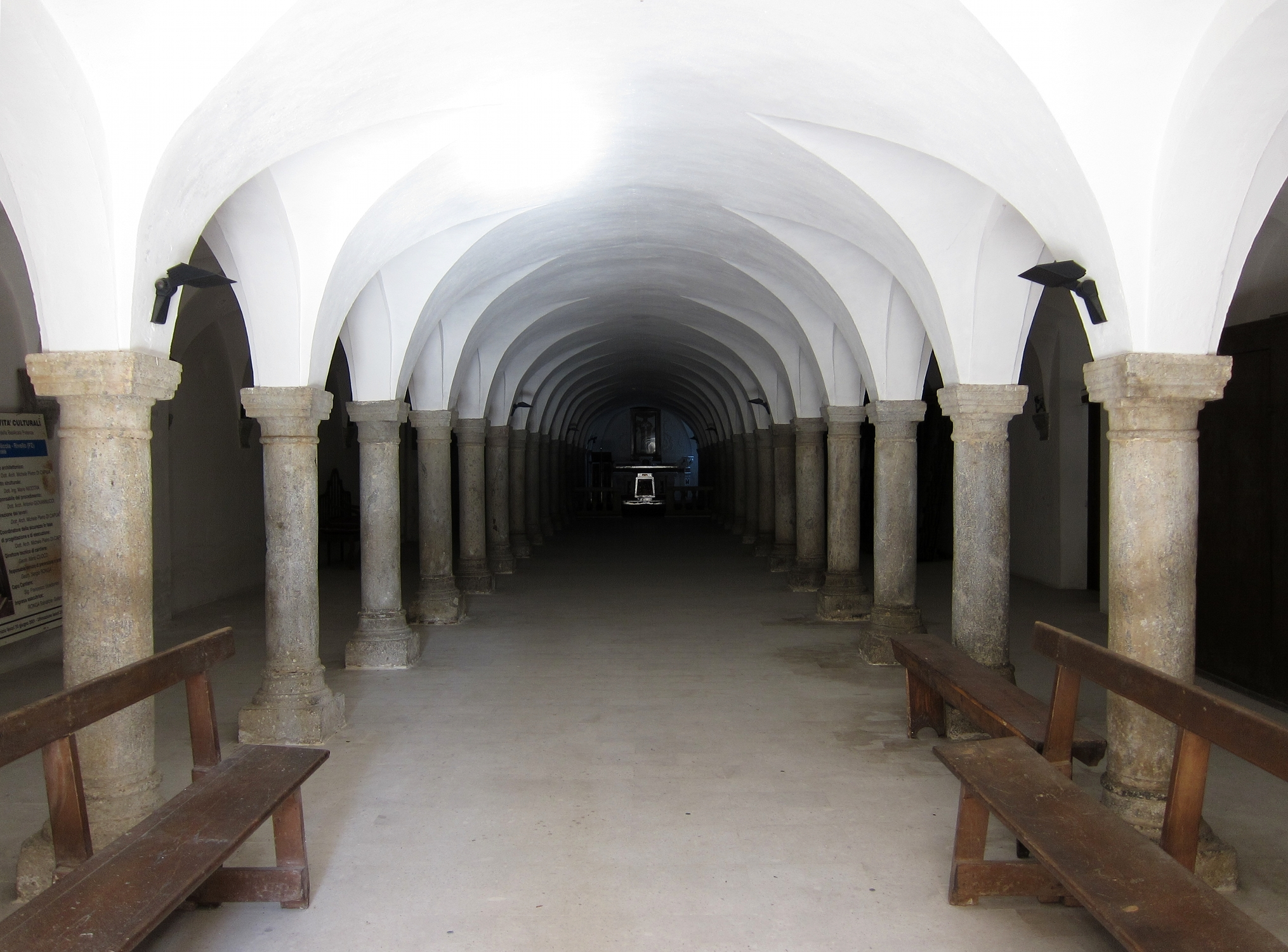 La crypte de la chiesa di San Nicola à Rivello (Basilicate).